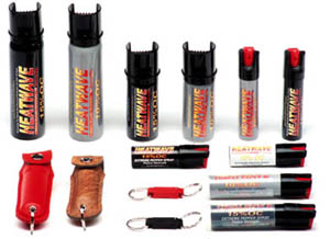 Kit Gas pimenta